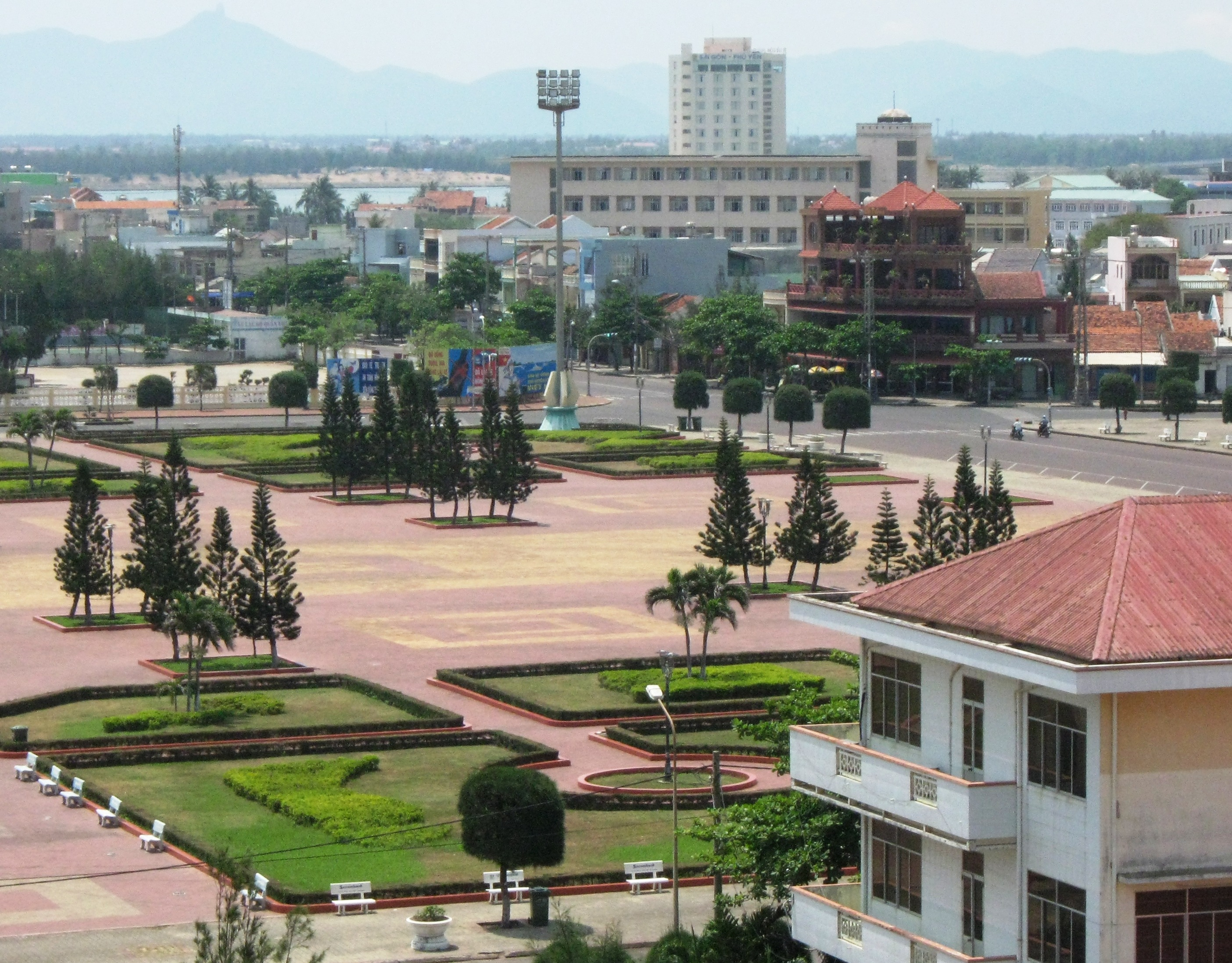 Туихоа (Вьетнам)